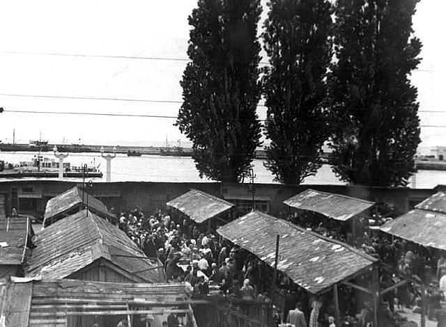 Новый базар в Сочи, Россия